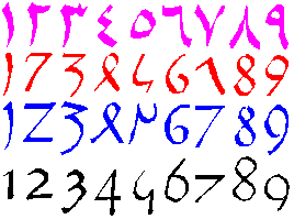 Arabic Numerals Origin